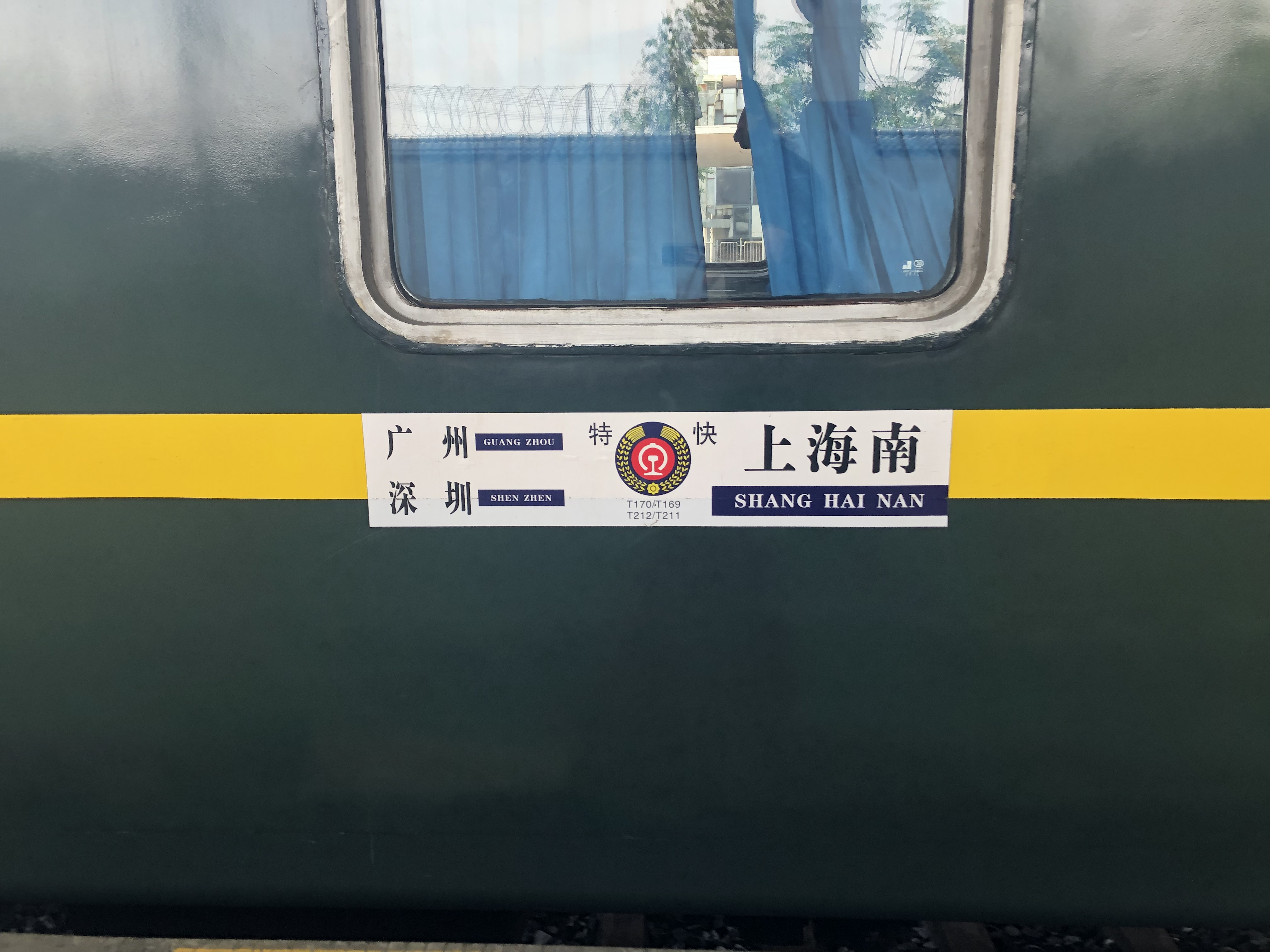 中文（中国大陆）: T169 T170 T212 T211 水牌